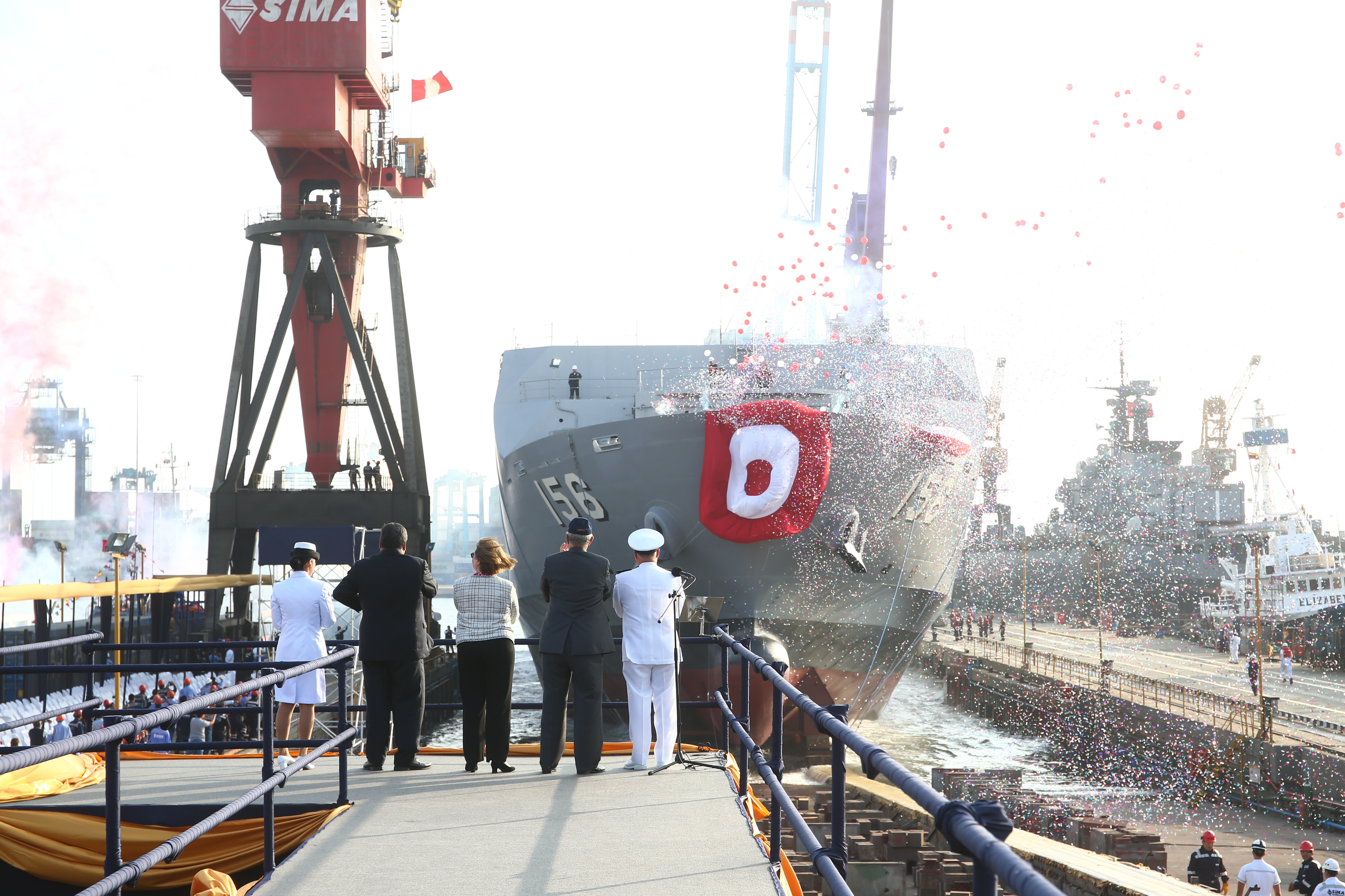 Botadura del casco del BAP Pisco en la grada del astillero SIMA Perú